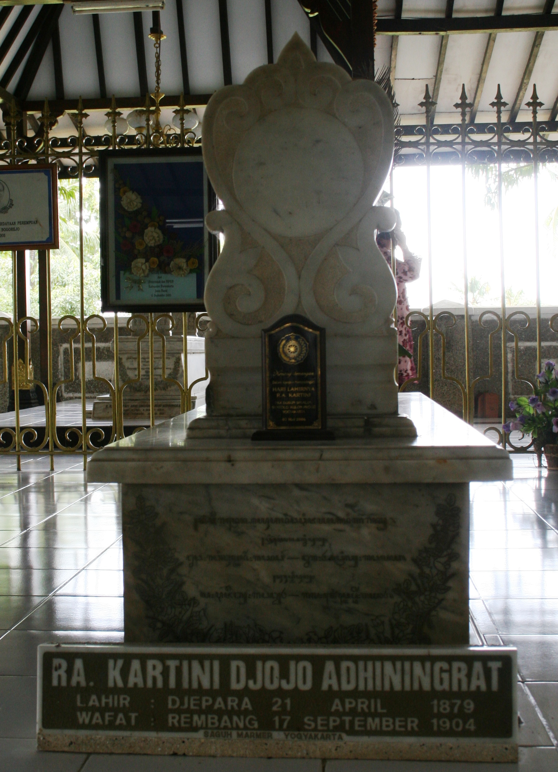 Keterangan gambar di Wikipedia Bahasa Jawa: Kula, ingkang damel karya punika, ambabar kanthi lisensi Kaparengaken dipunsalin, nyebaraken, lan/utawi ngéwahi dhokumen puniki kanthi prasyarat: Lisensi Dhokumèntasi mardika GNU, Gagrag 1.2 utawi langkung énggal ingkang kababar déning Free Software Foundation; tanpa Pérangan Invarian, tanpa Teks Sampul-Ngajeng, lan tanpa Teks Sampul-Wingking. Kedah selaras kanthi paugeran wonten ing penyangkalan.